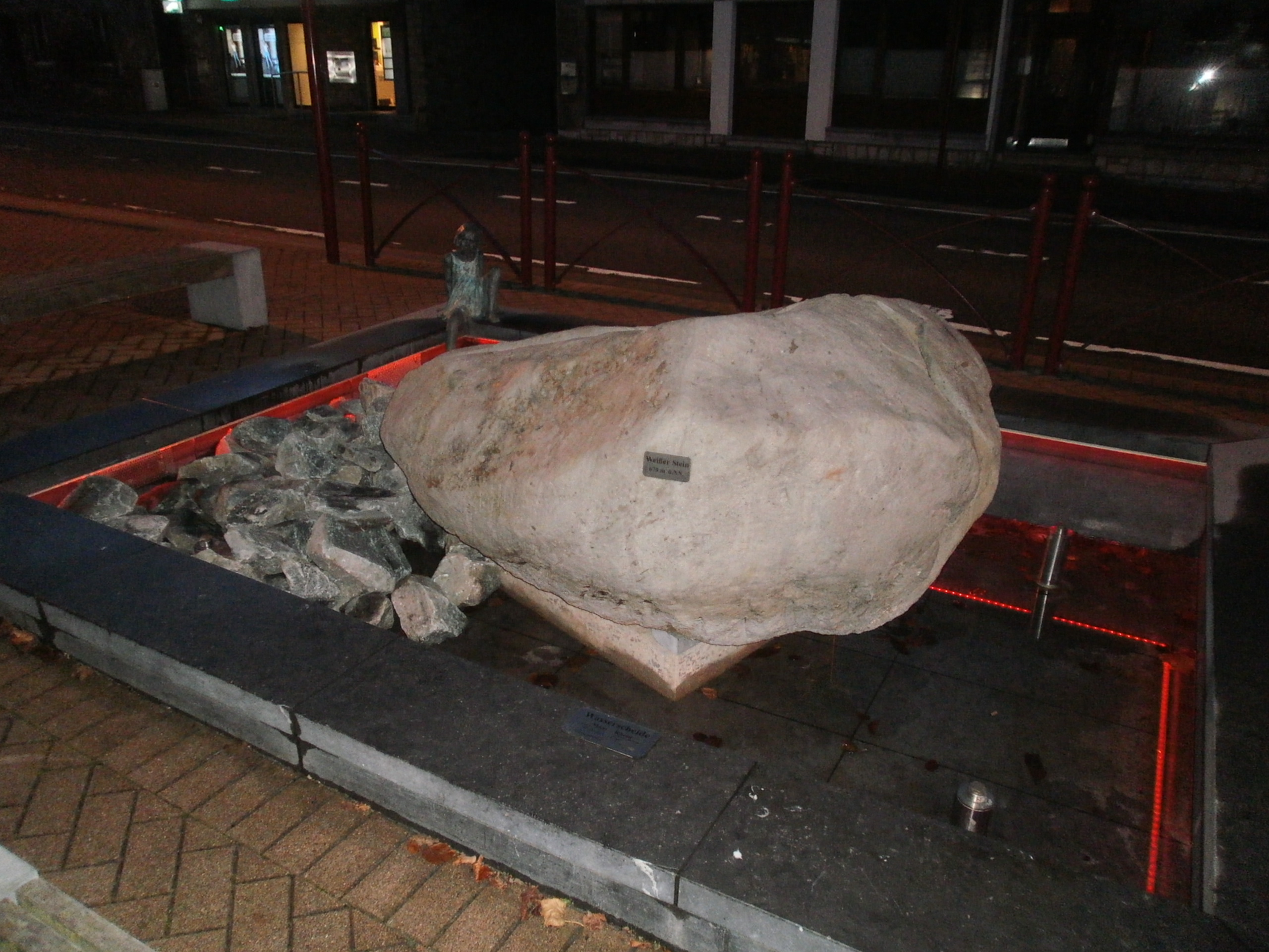 Mälestusmärk raekoja ees Ardennide valgele mäekivile, ja ühtlasi on samanimeline (Weisse Stein) ka Belgia kõrguselt II mäetipp.